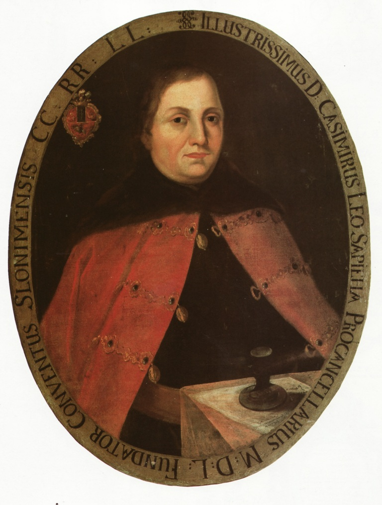 Беларуская (тарашкевіца): Партрэт Казімера Льва Сапегі (Kazimier Leŭ Sapieha)